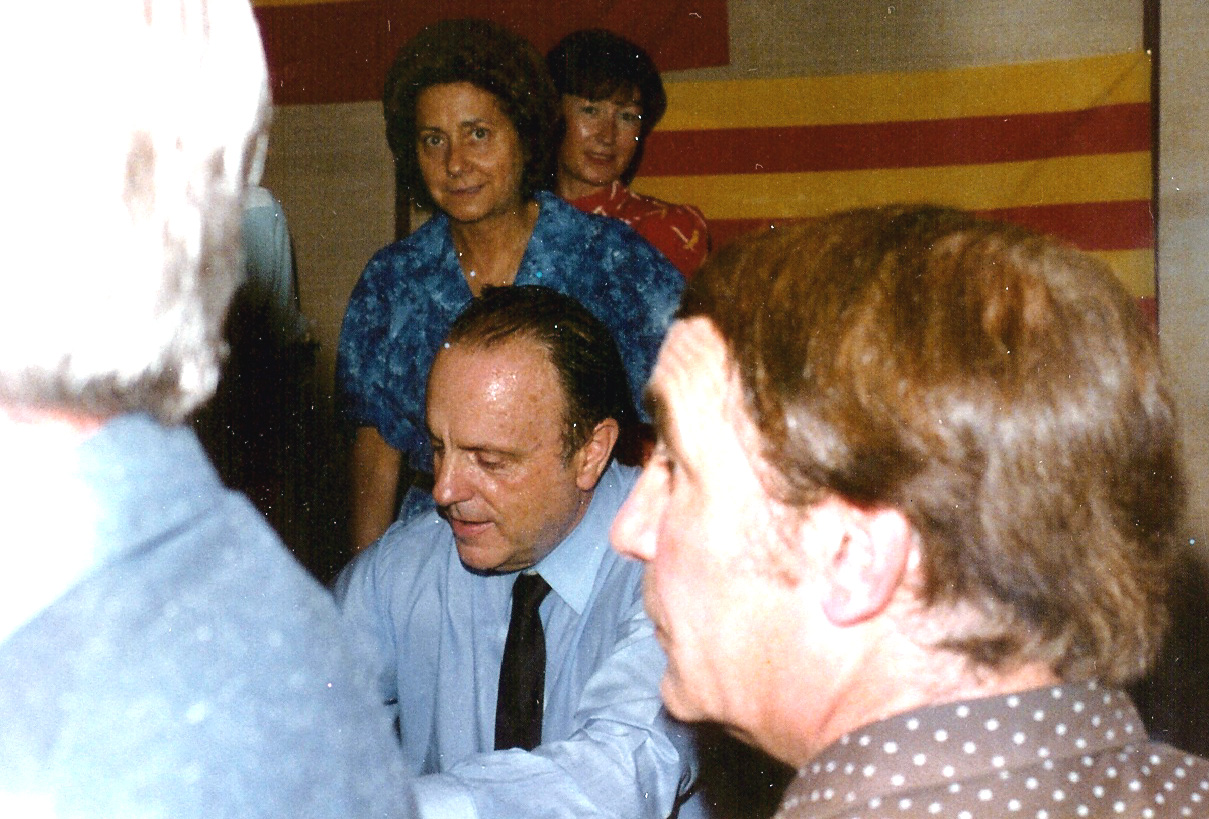 Manuel Fraga Iribarne en fecha indeterminada. Posiblemente en una campaña electoral durante la Transición Española.